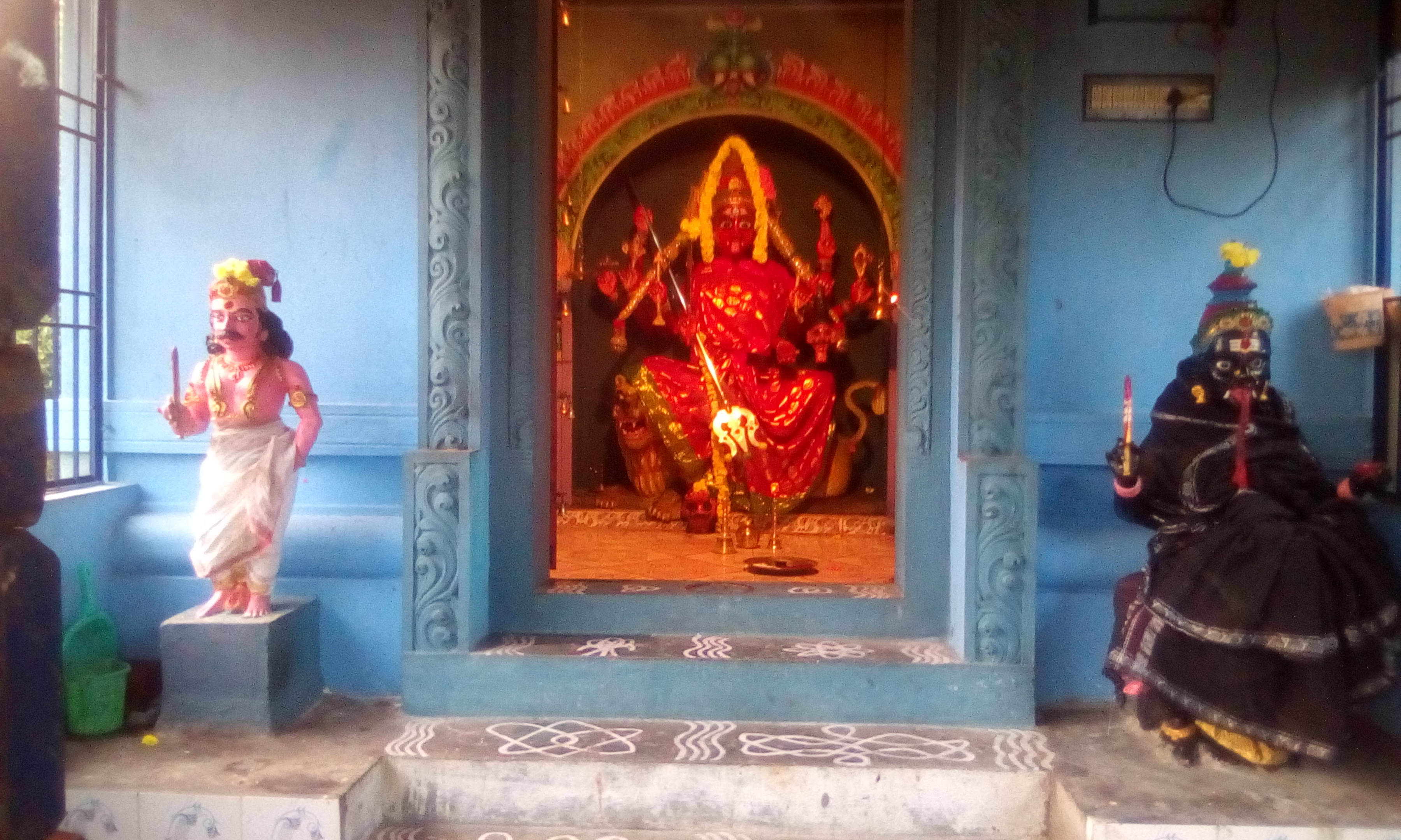 temple image of maranthur kabaleeshwari